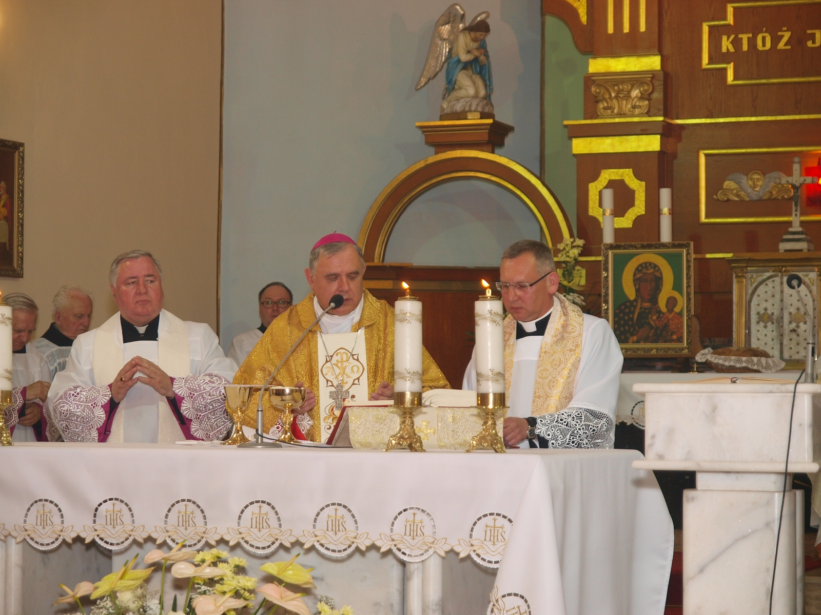 Chabielice uroczysta msza św. pod przewodnictwem bp.Ireneusza Pękalskiego z okazji 50-lecia konsekracji kościoła.